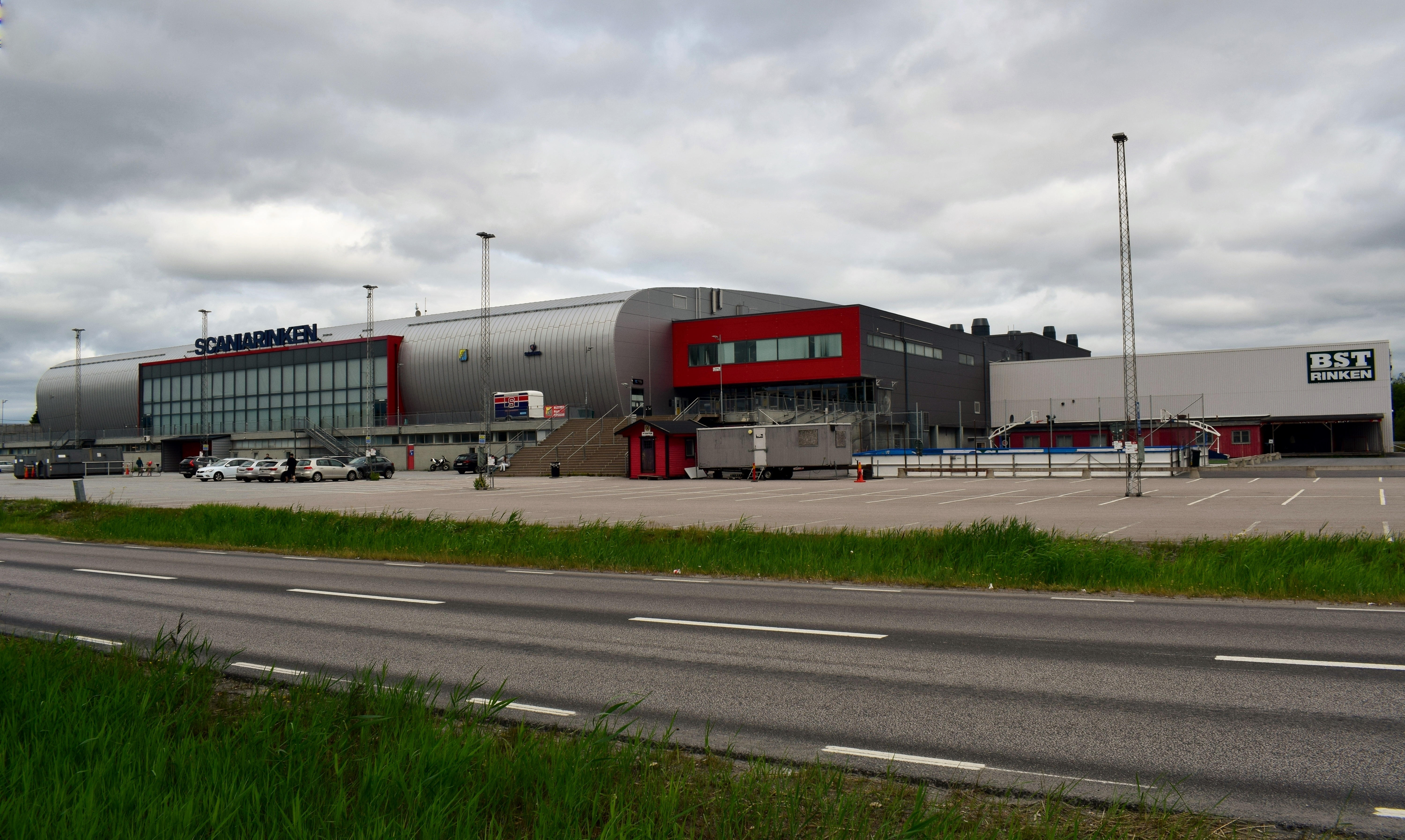 Scaniarinken i Södertälje